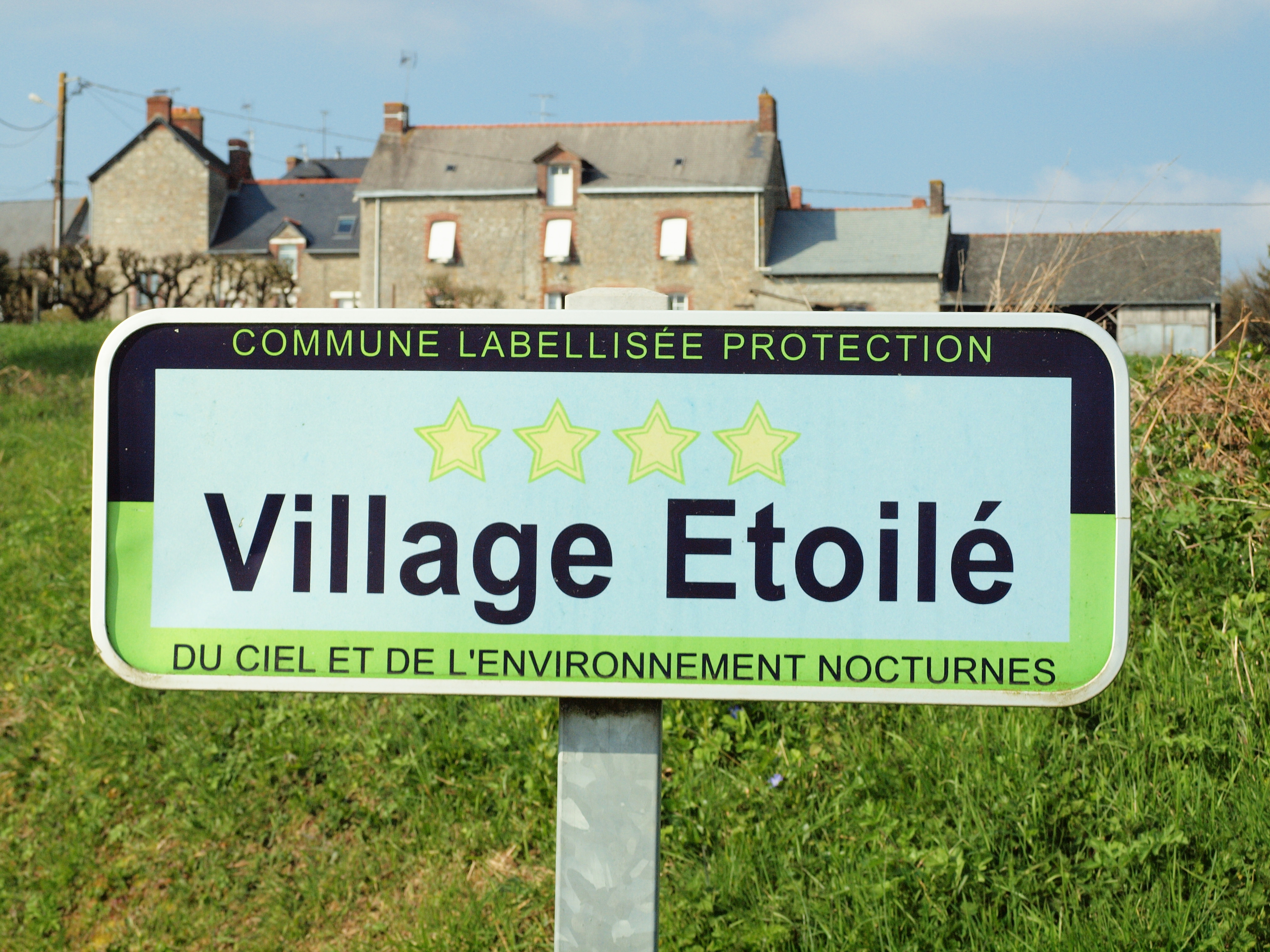 La Couyère (Ille-et-Villaine, France)